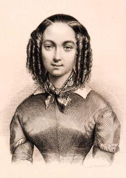 Portrait of Rose Chéri